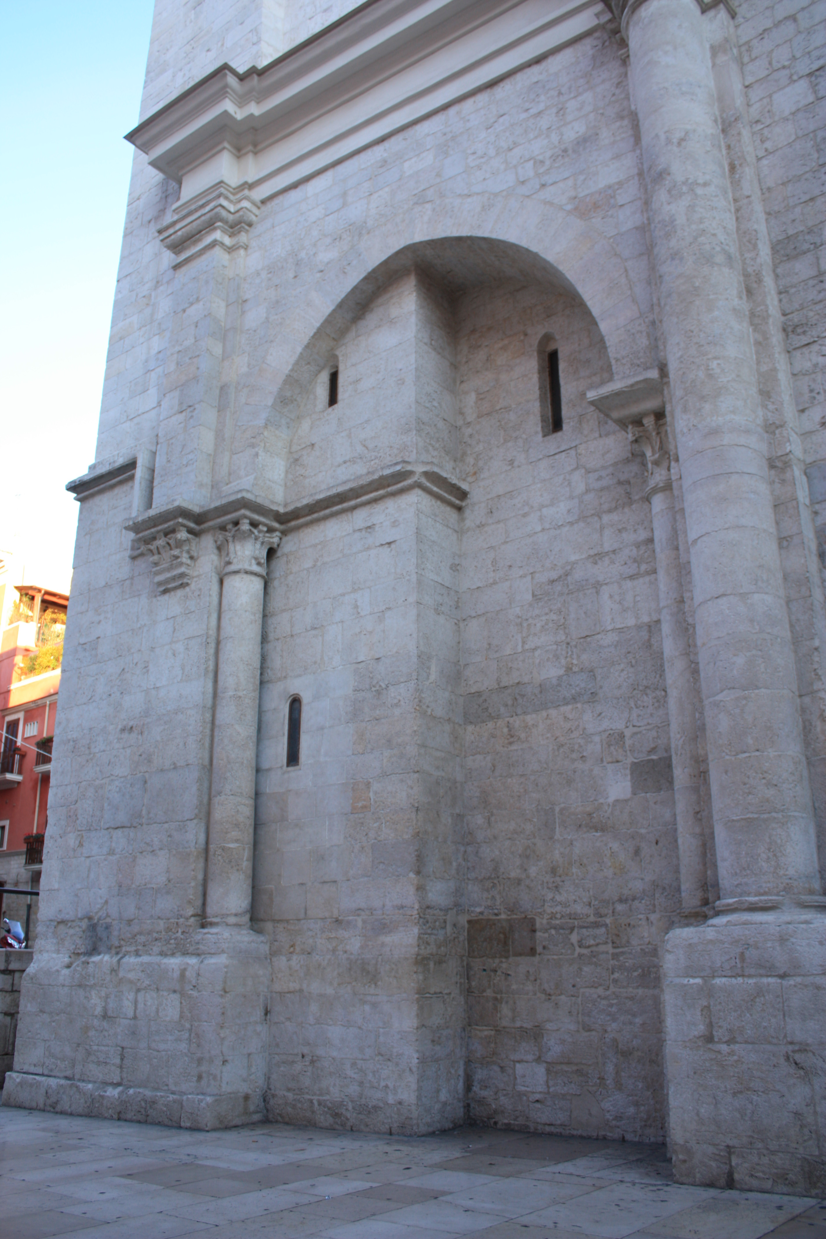 Particolare dell'antico campanile visibile all'interno dell'arco sul fronte ovest.